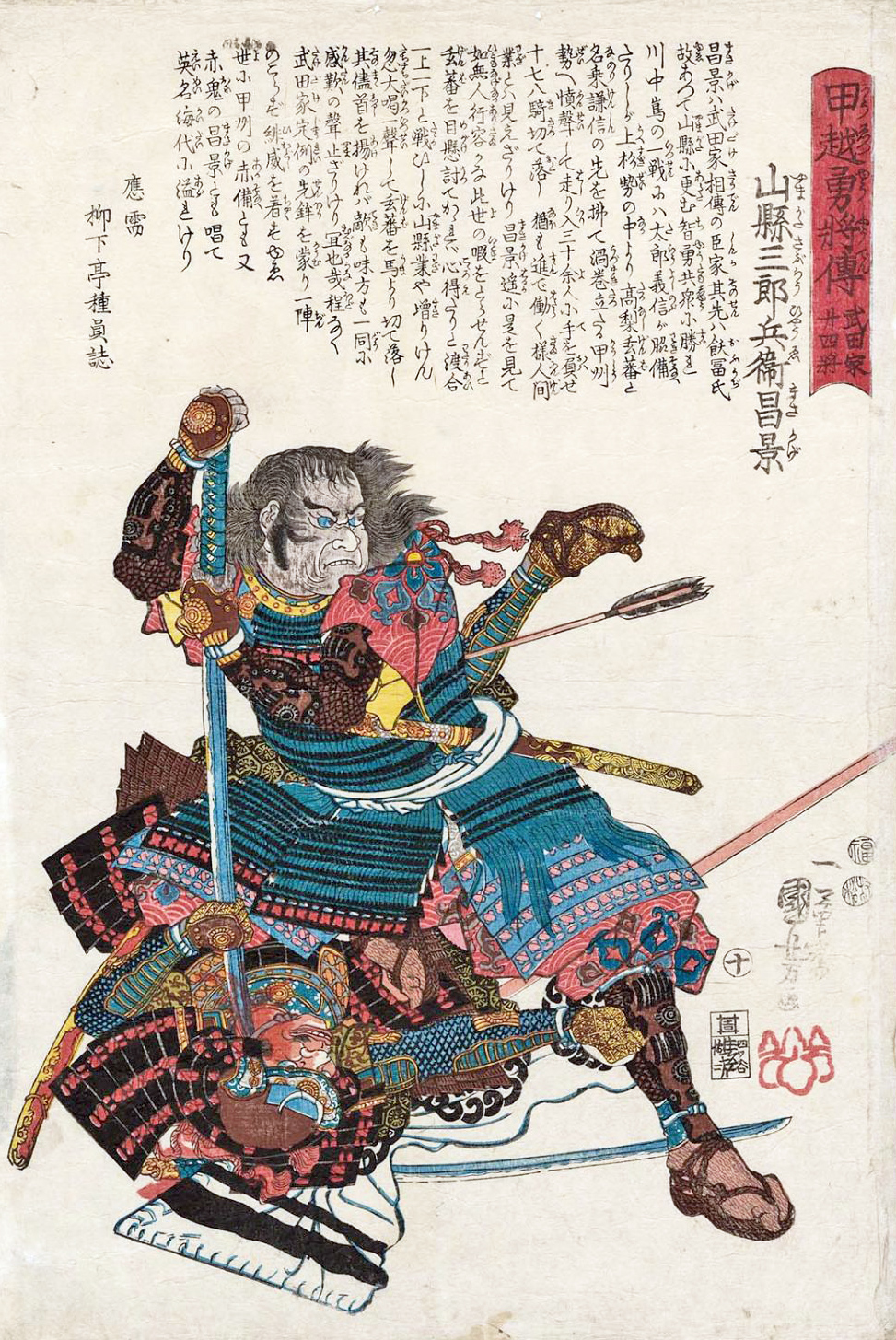 「甲越勇將傳武田家廾四將 ：山縣三郎兵衛昌景」1848年作